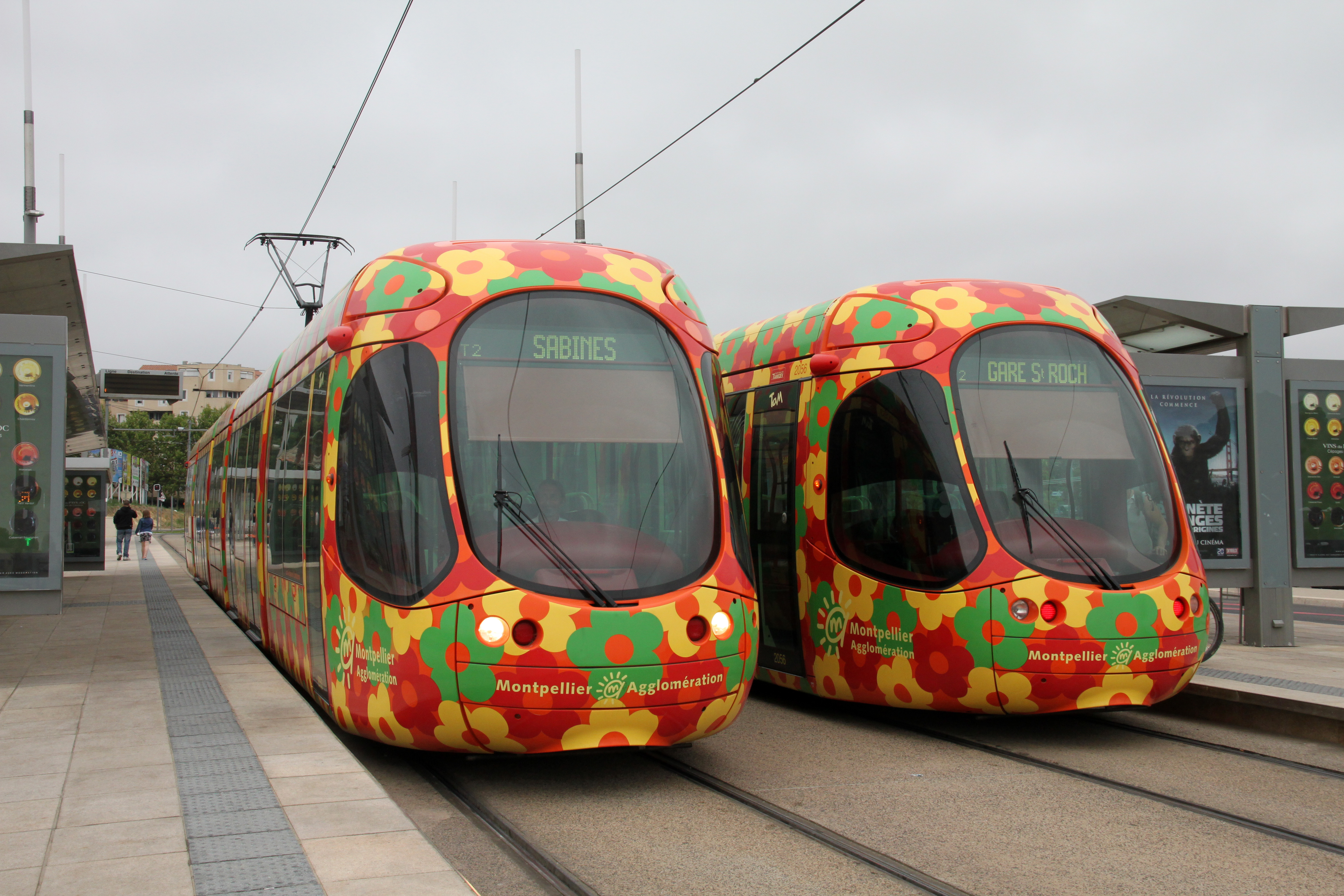 Twee trams type Citadis 302 van tramlijn T2 in Montpellier.